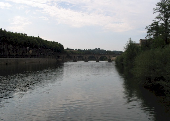 photo perso du fleuve Vidourle à Sommières (Gard, France)